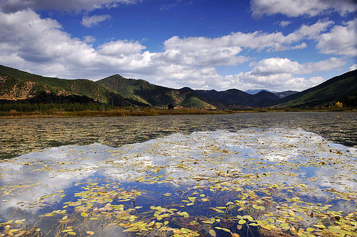 Grass Sea at Lugu Lake